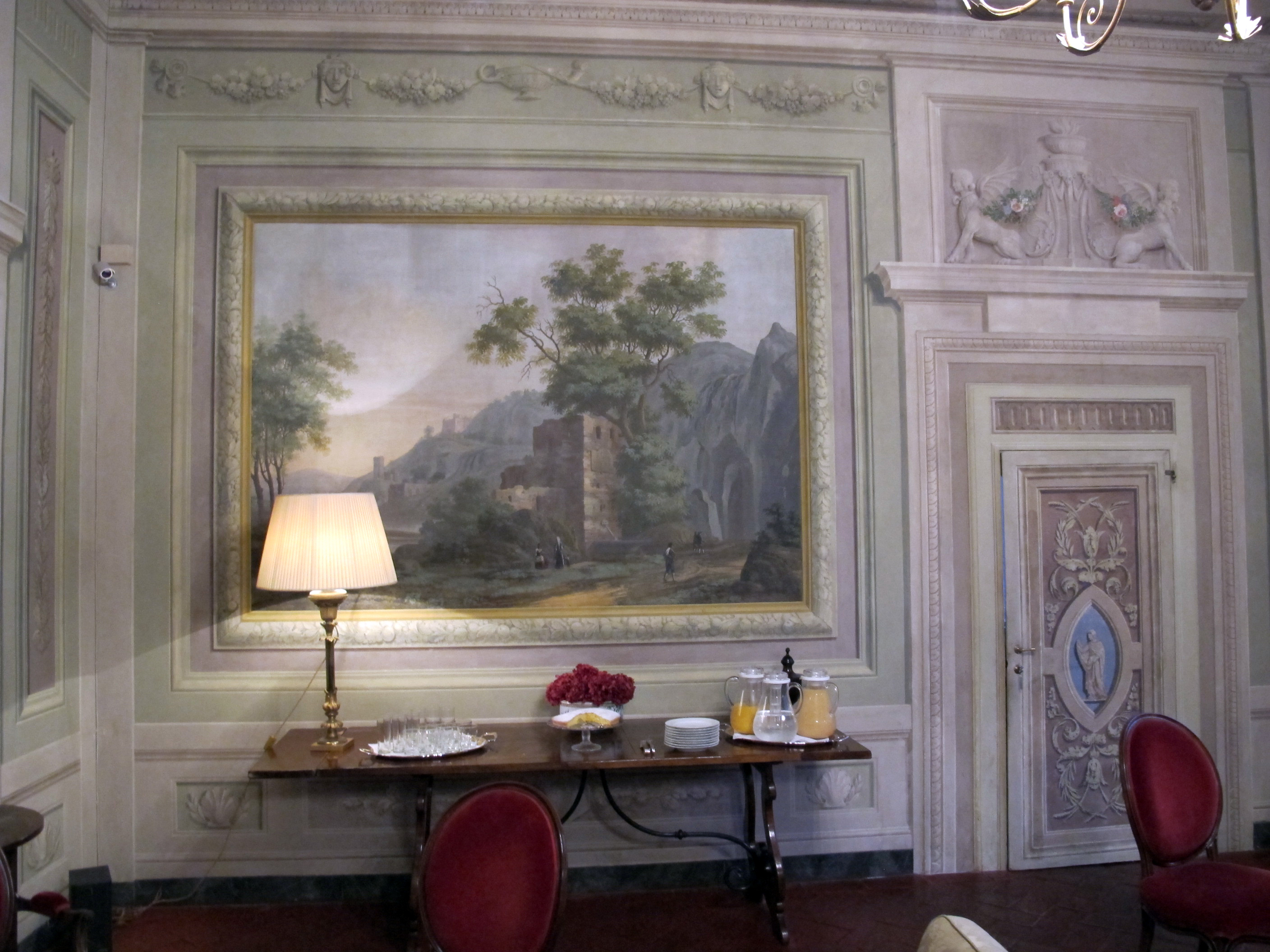 Palazzo niccolini al duomo, salottino